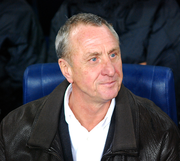 Cruyff a la banqueta del Camp Nou, com a entrenador de la selecció de Catalunya.